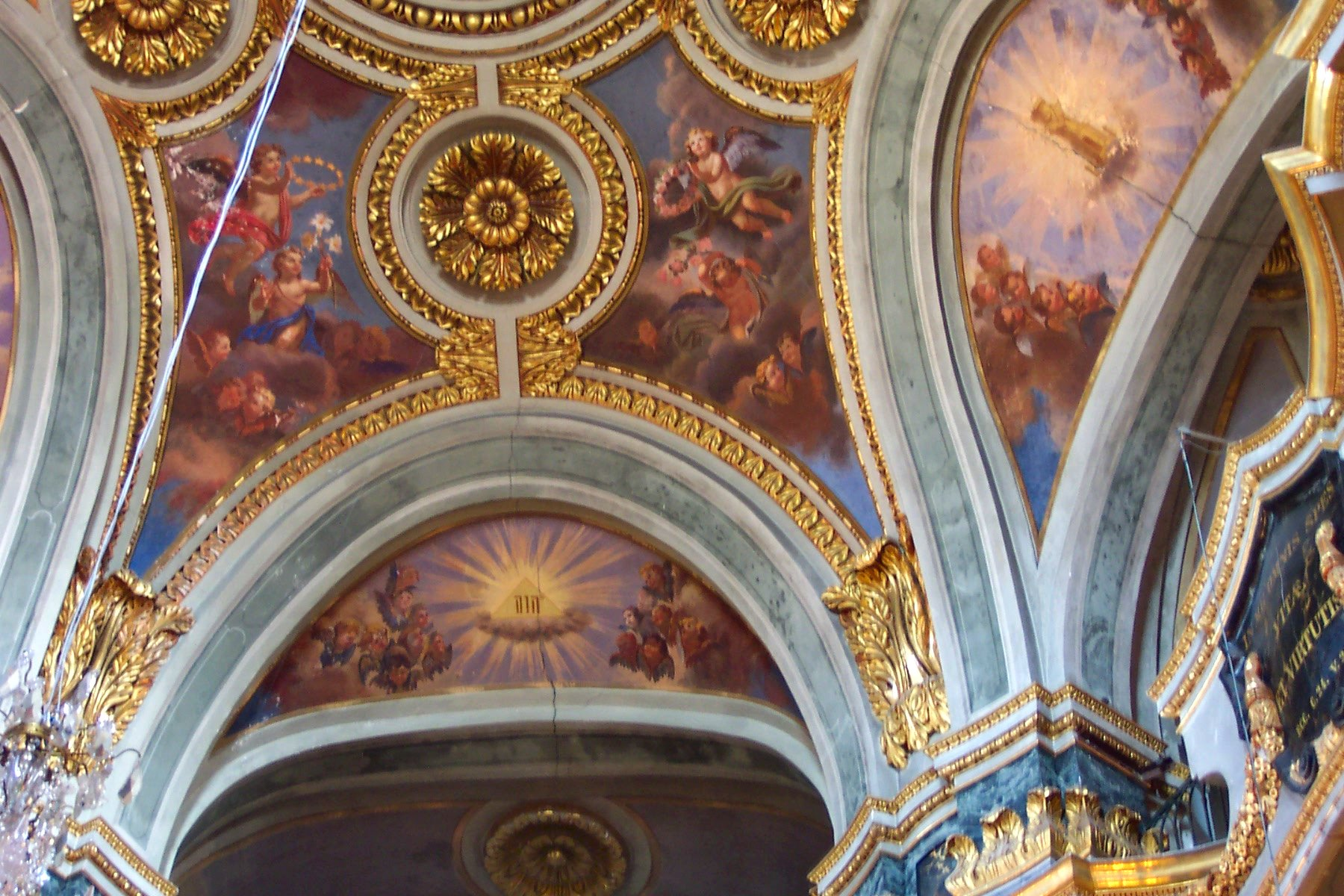 Nice-Saleya. Chapelle de la Misericorde